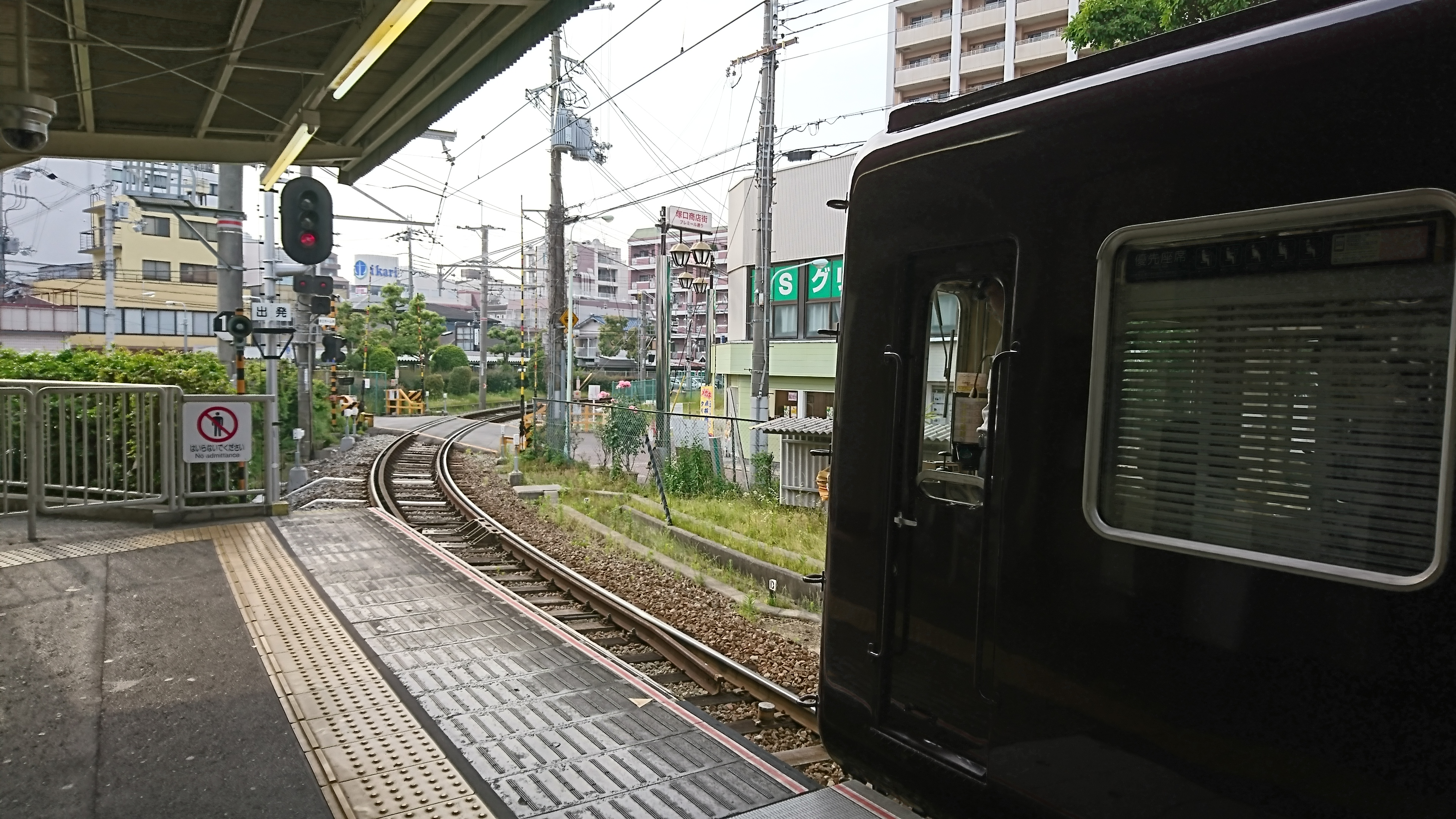 阪急塚口駅 伊丹線ホーム